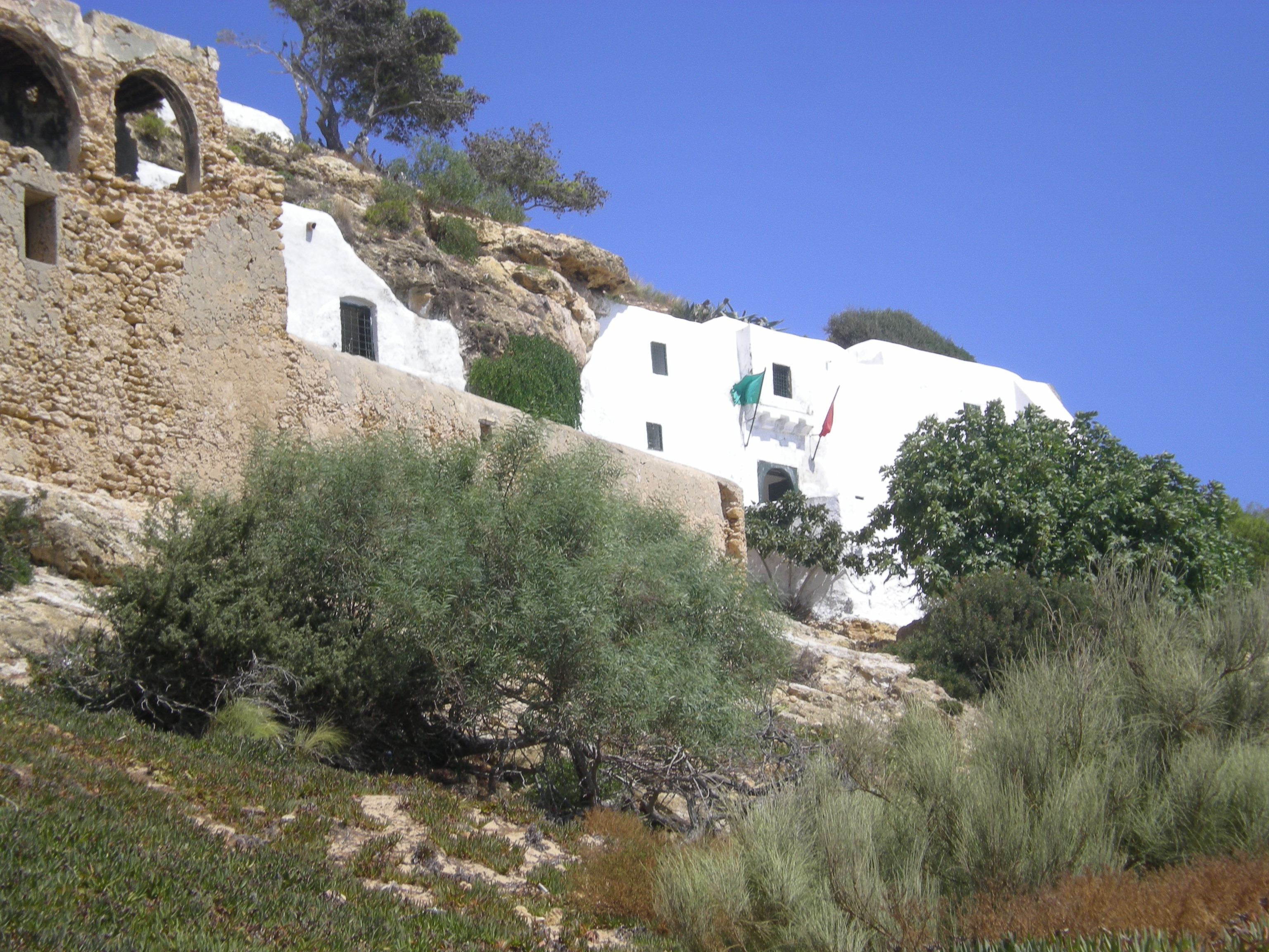 Sidi Ali El Mekki's Zaouia, Tunisia